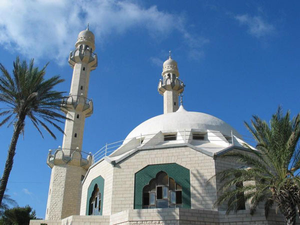 A mosque in Haifa